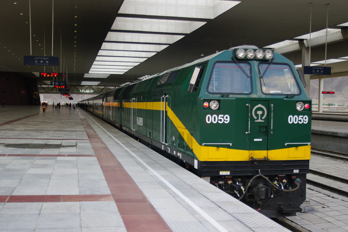 Lhasabahn im Bahnhof Lhasa